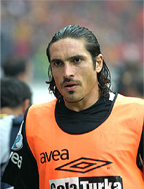 Mustafa Dogan (Besiktas Istanbul) beim Spiel um den türkischen Super-Cup (Süper Kupa) zwischen Galatasaray und Besiktas Istanbul (1:0) am 30. Juli 2006 in Frankfurt am Main.